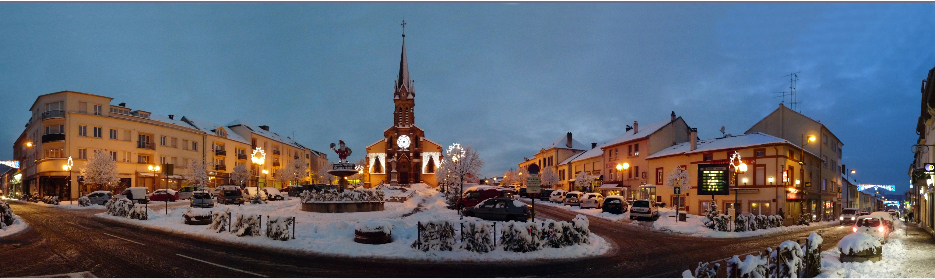 Stiring Wendel place de l'église